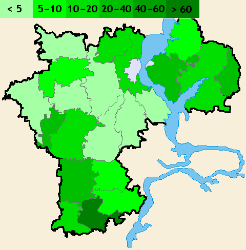 Tatars in Ulyanovsk Oblast